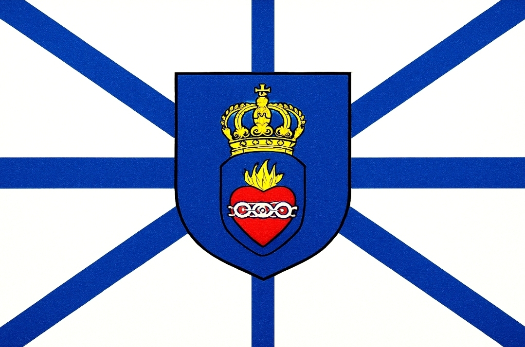 Bandeira de Coração de Maria, Bahia, Brasil